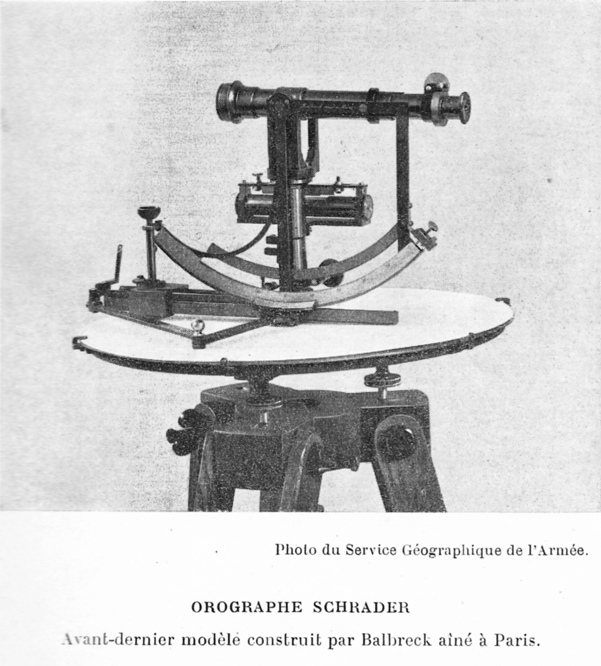 Orographe Schrader, modèle Balbreck